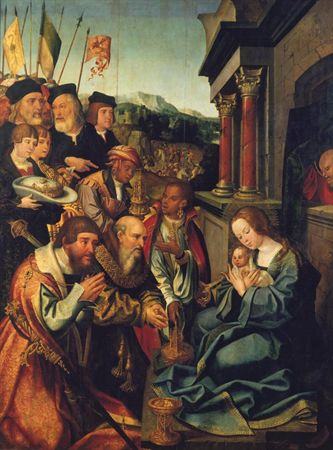 Quer este painel, quer os outros que compunham o retábulo dito de São Bento - a Visitação, a Apresentação do Menino no Templo e O Menino Jesus entre os Doutores, todos no Museu Nacional de Arte Antiga, assim como o desaparecido Cristo deposto da Cruz -, pertenciam ao conjunto retabular da Capela do Salvador da Igreja do Convento de São Francisco, em Lisboa. Daí transitaram no século XVII para a Capela de Nossa Senhora dos Prazeres do Mosteiro de São Bento da Saúde e, por fim, com a extinção das ordens religiosas em 1834, para o Museu Nacional de Arte Antiga. Adriano de Gusmão publicou um documento de 17 de Maio de 1525, descoberto por Vitorino Magalhães Godinho (Torre do Tombo, Corpo Cronológico, Parte II, maço 125, nº 150), de acordo com o qual os pintores de Lisboa Jorge Leal e Gregório Lopes tinham acabado de pintar o retábulo para a Capela do Salvador do Mosteiro de São Francisco, trabalho que iria ser avaliado por Jorge Afonso (pintor régio) e por Antão Leitão (pintor do Senado). Com base neste testemunho, a que se junta, igualmente, o documento encontrado por Reinaldo dos Santos na Torre do Tombo e que pertencia a um Livro de Notas do Mosteiro de São Bento da Saúde (Códice nº 21 do Cartório de São Bento), e um recibo de pagamento a Gregório Lopes datado de 1520 e publicado por Seabra carvalho, pôde-se determinar tanto a autoria/parceria da obra como a sua data de execução.